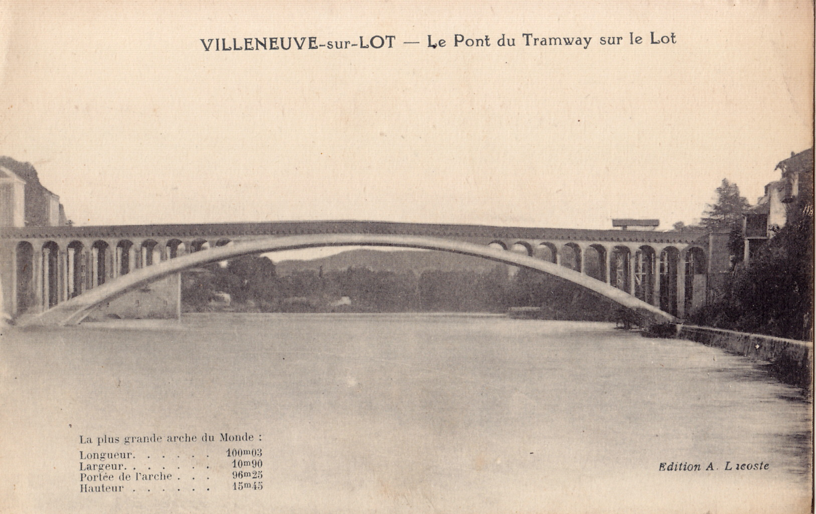 Carte postale ancienne éditée par A. Lacoste : VILLENEUVE-SUR-LOT - Le Pont du Tramway sur le Lot